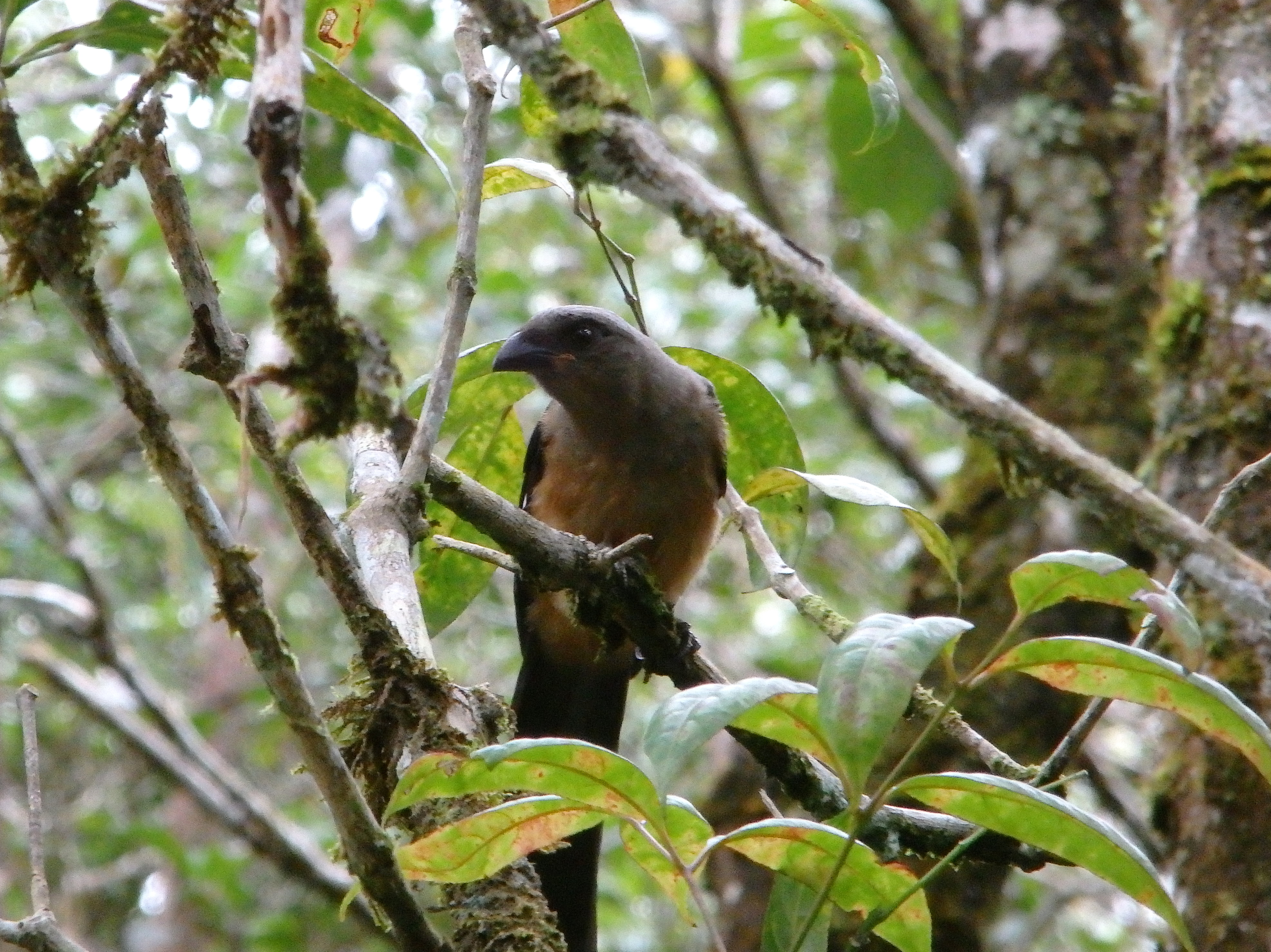 Kinabalu Park, Ranau, Sabah, Malaysia